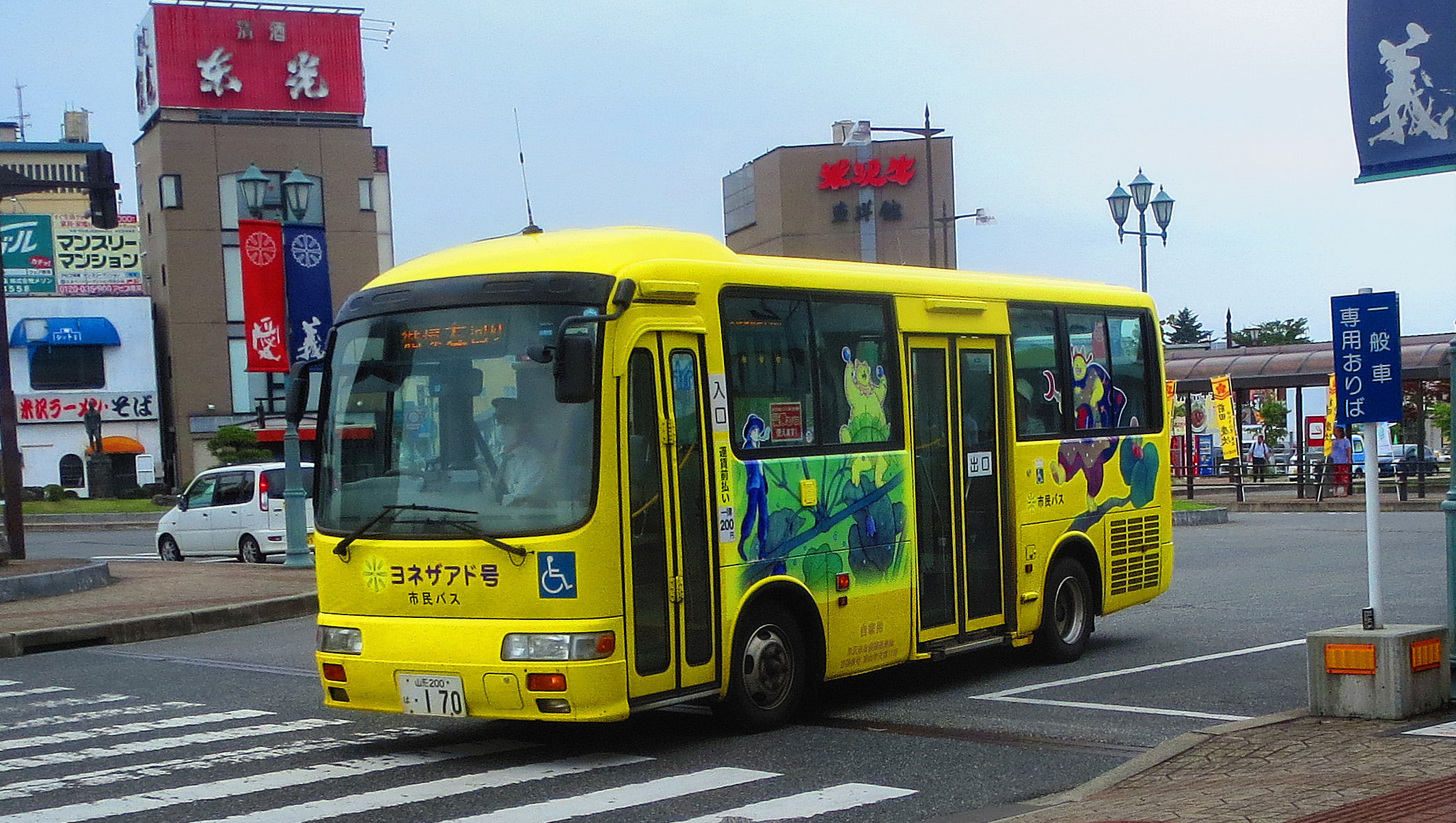 市街地循環路線（左回り）